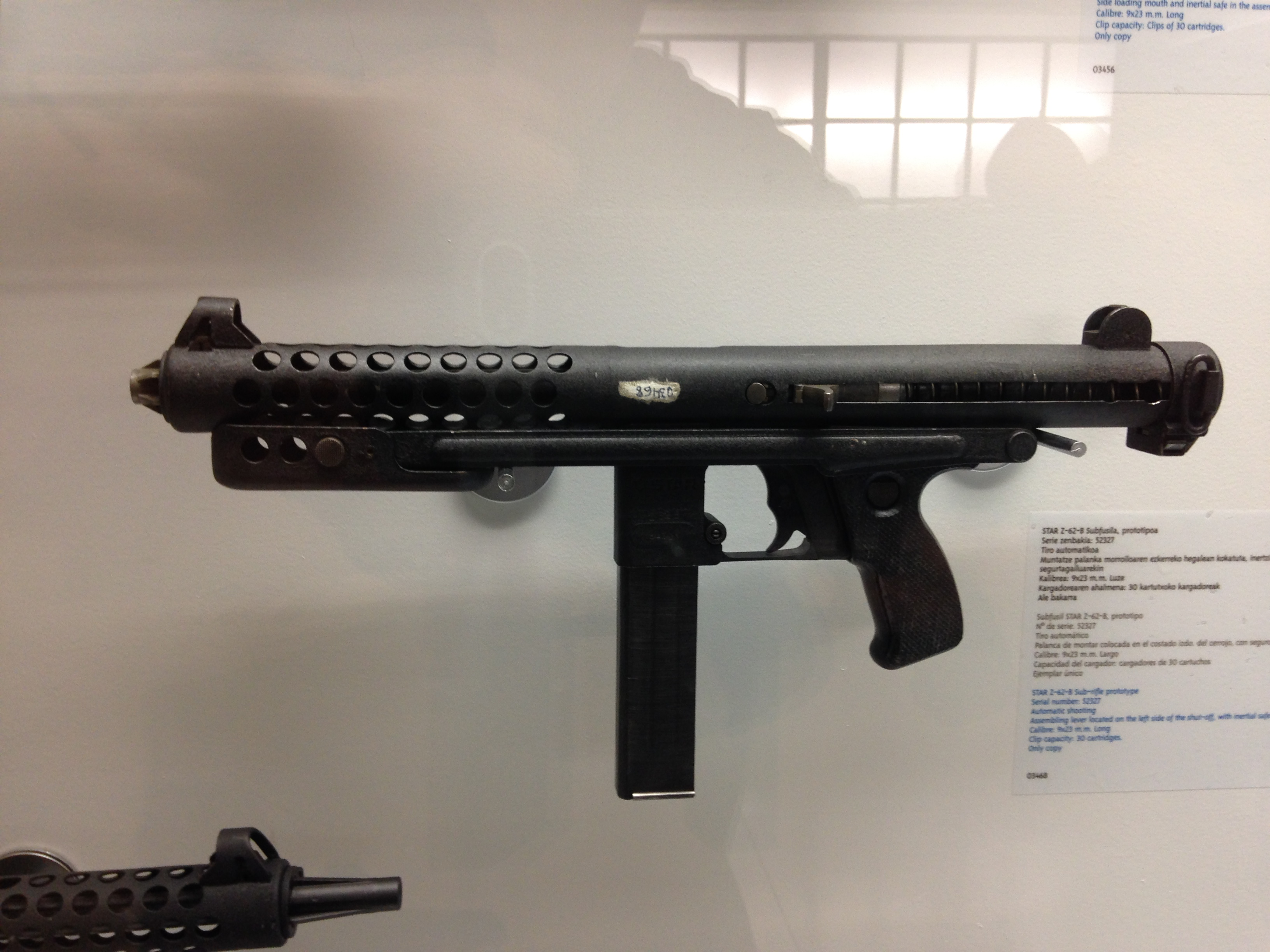 Museo de la Industria Armera de Éibar. Subfusil Z-62 fabricado por STAR de Eibar.